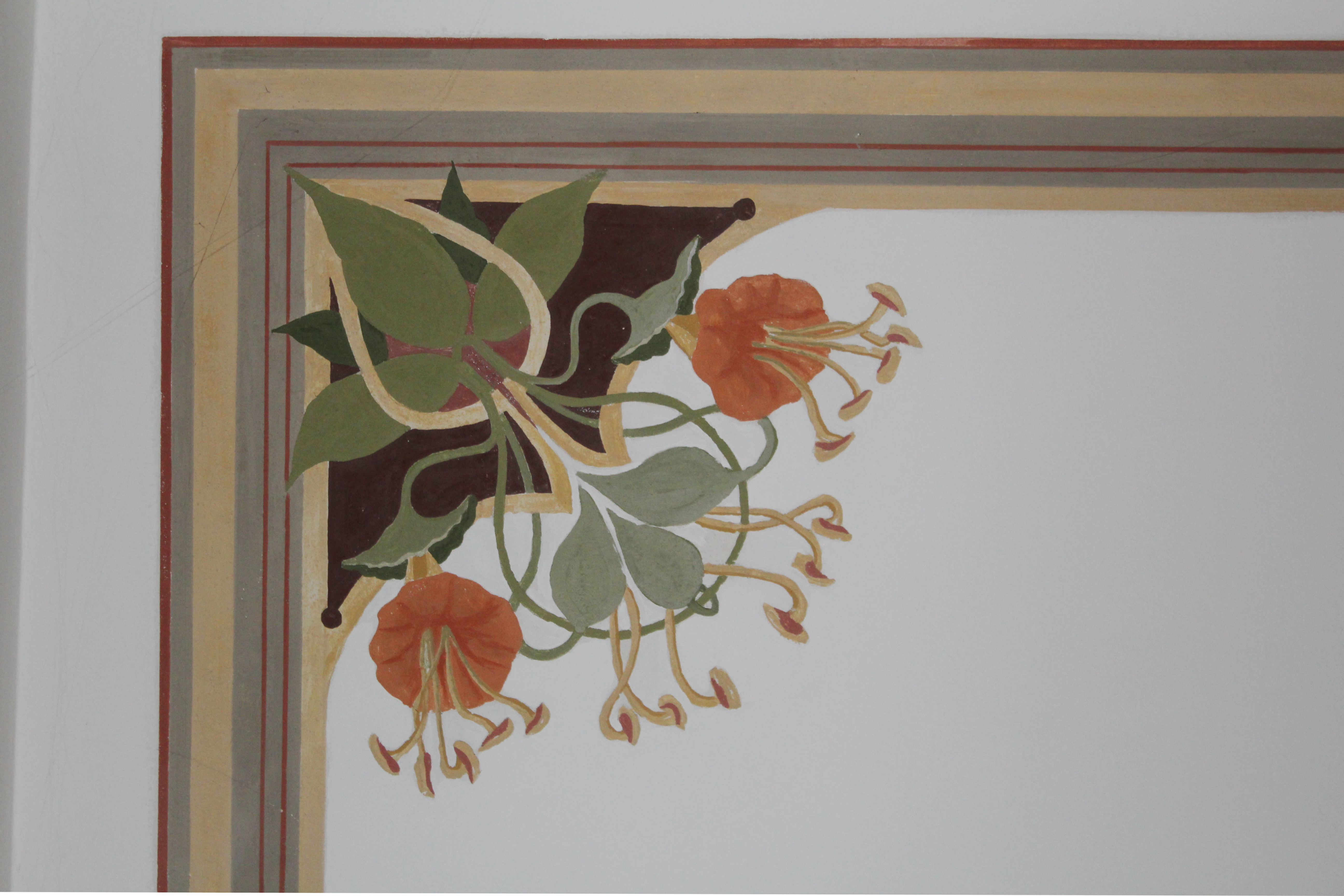 Evangelische Kapelle Oberndorf, Solms, Hessen, Deutschland